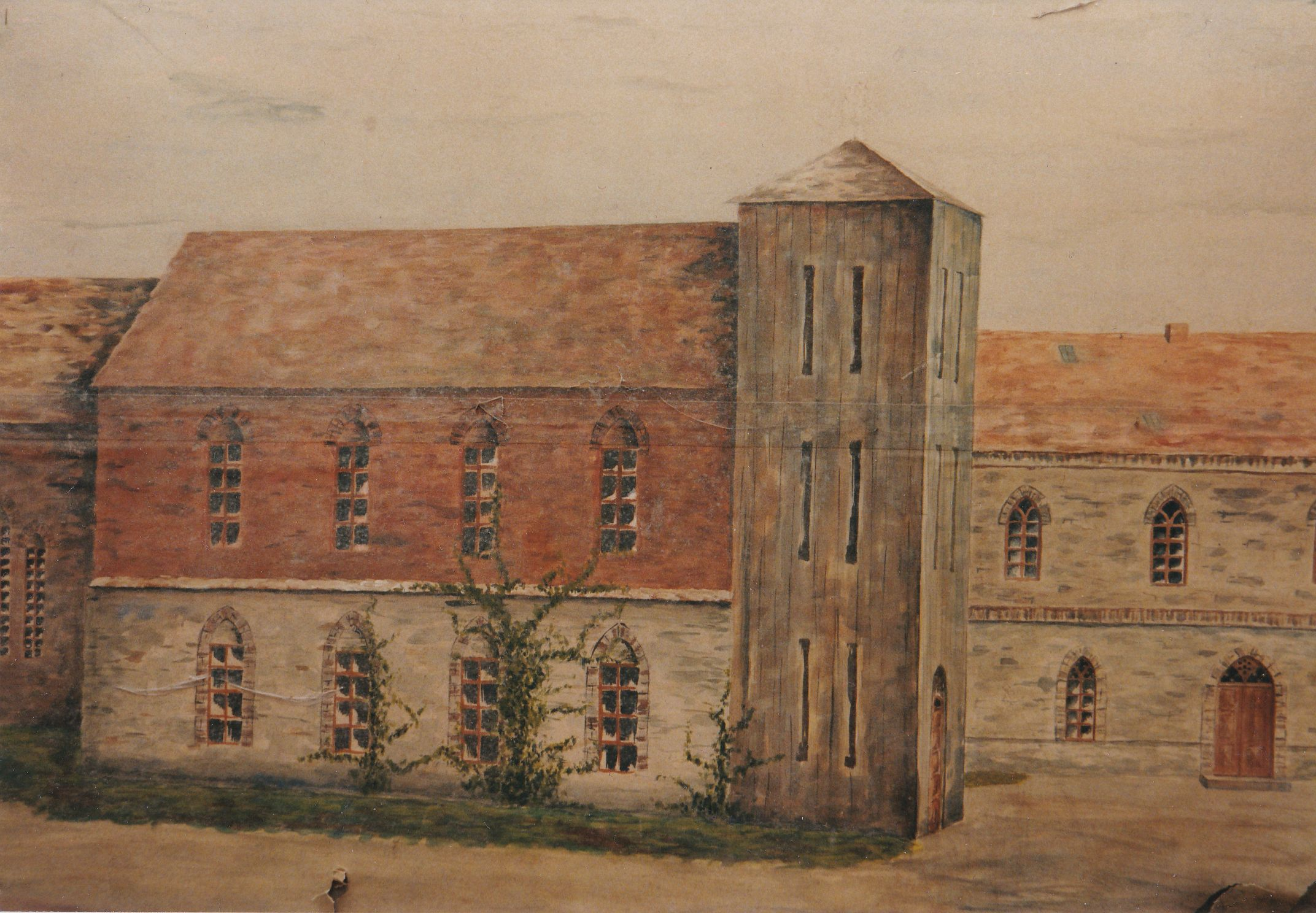 Nach Beschreibungen der Eltern gemaltes Bild der Klosterkirche Dobbertin vor dem Umbau 1829–1857.